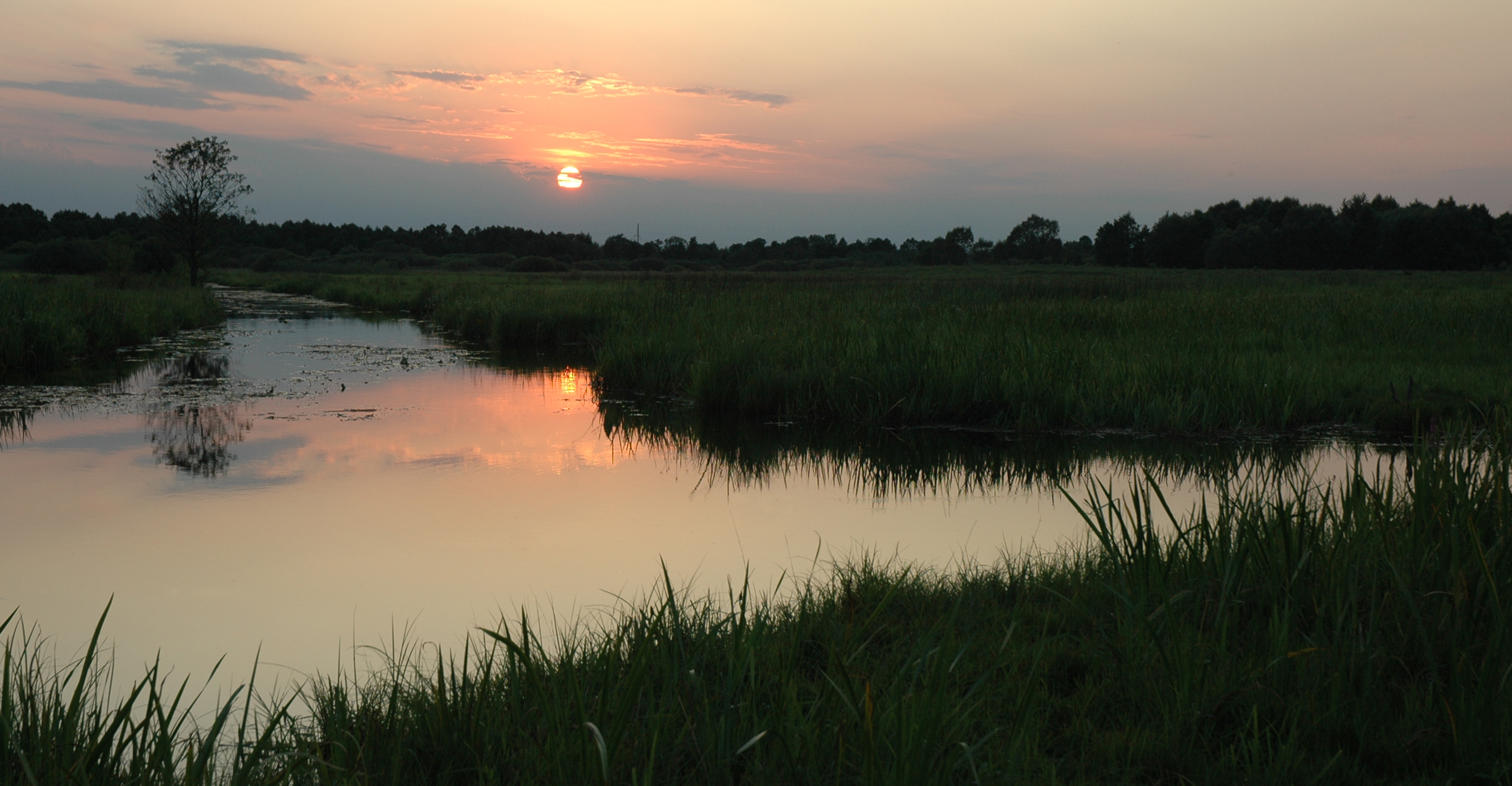 «Стохід», Камінь-Каширський і Маневицький райони